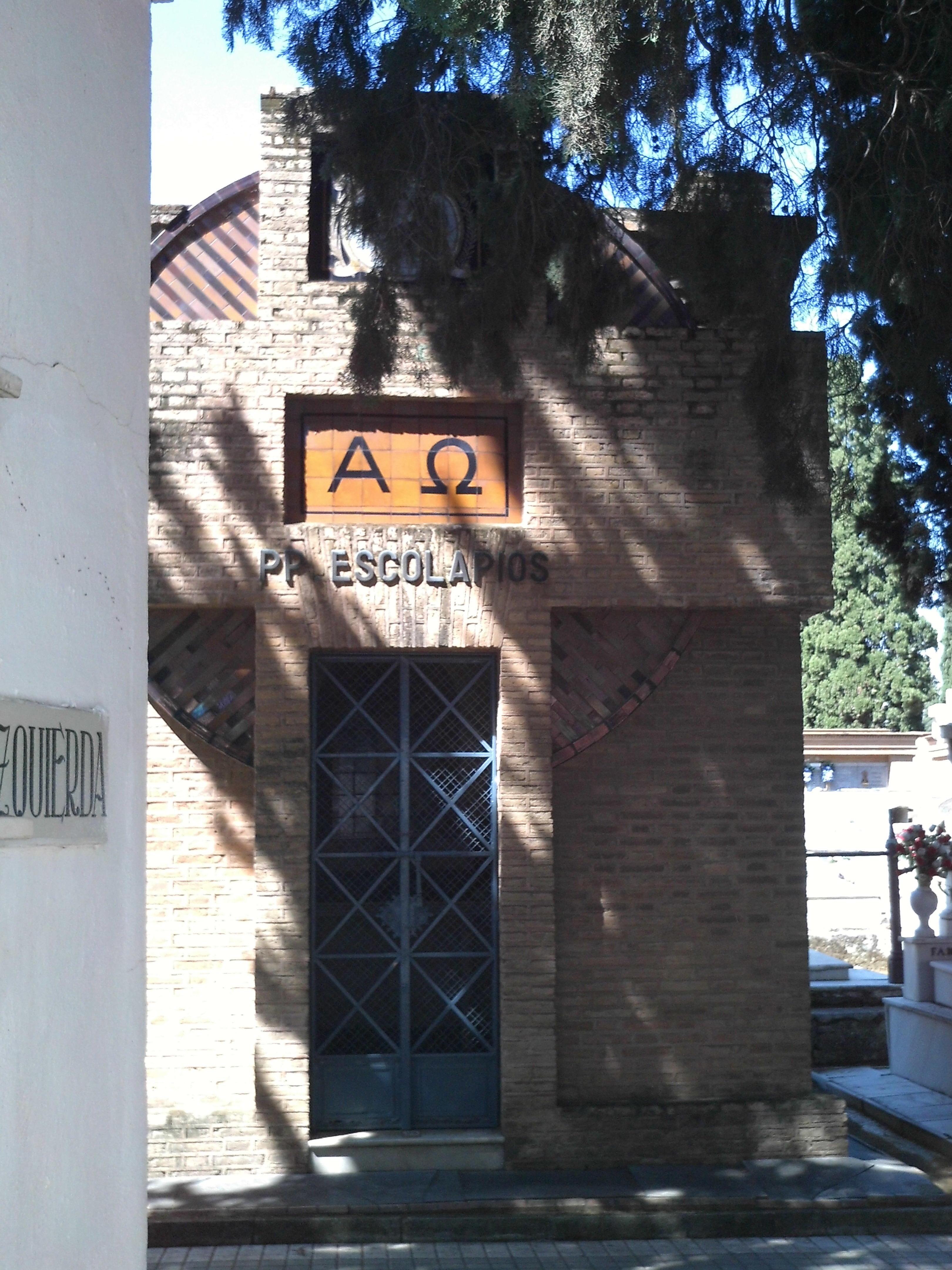 Panteón de los Padres Escolapios. Fue diseñado por Juan Talavera y Heredia en 1947. Cementerio de San Fernando, Sevilla, Andalucía, España.